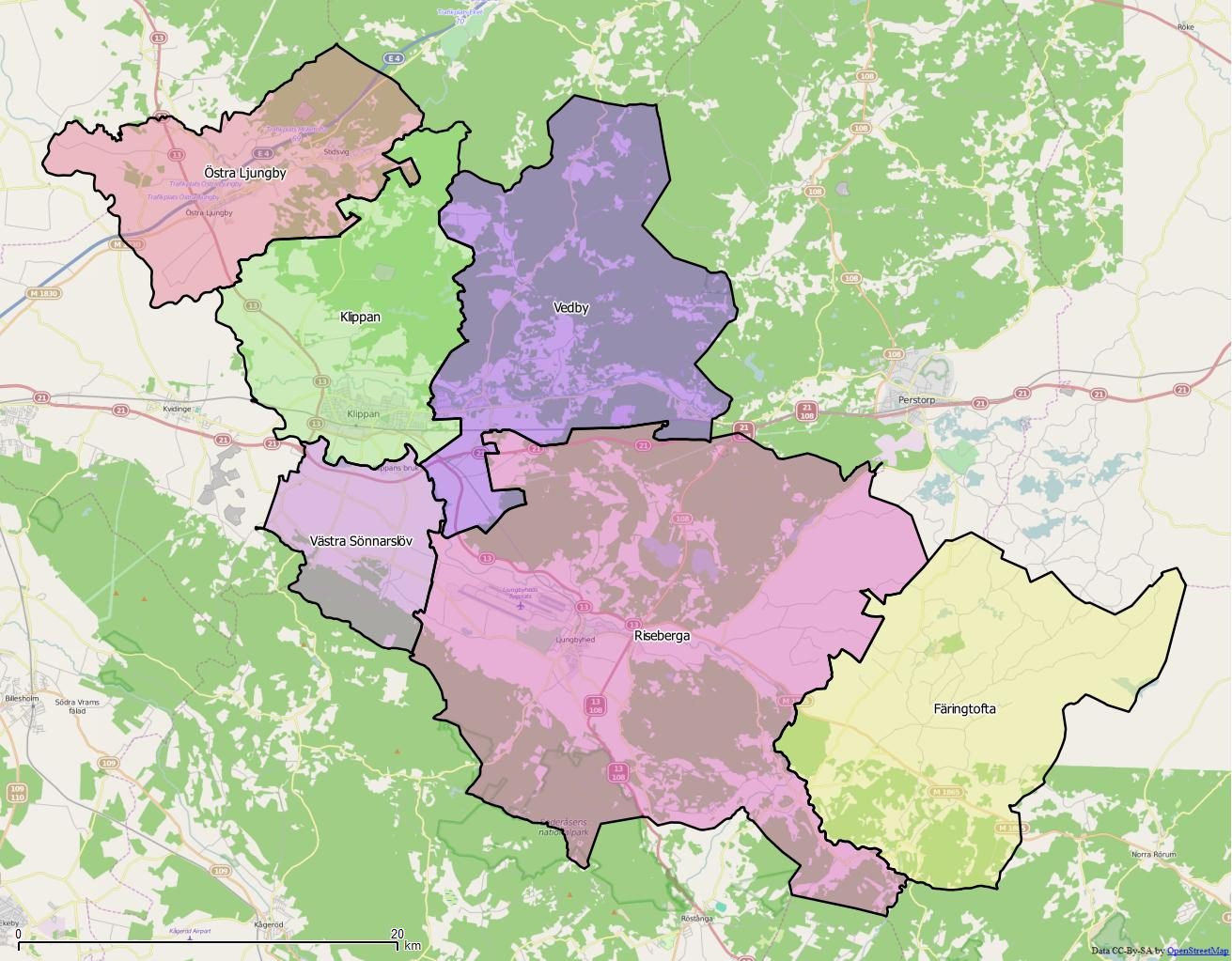 Distriktsindelningen i Klippans kommun World file: 49.52331734151704268 0 0 -49.52331734151704268 1442851.14034277969039977 7606906.13997020199894905